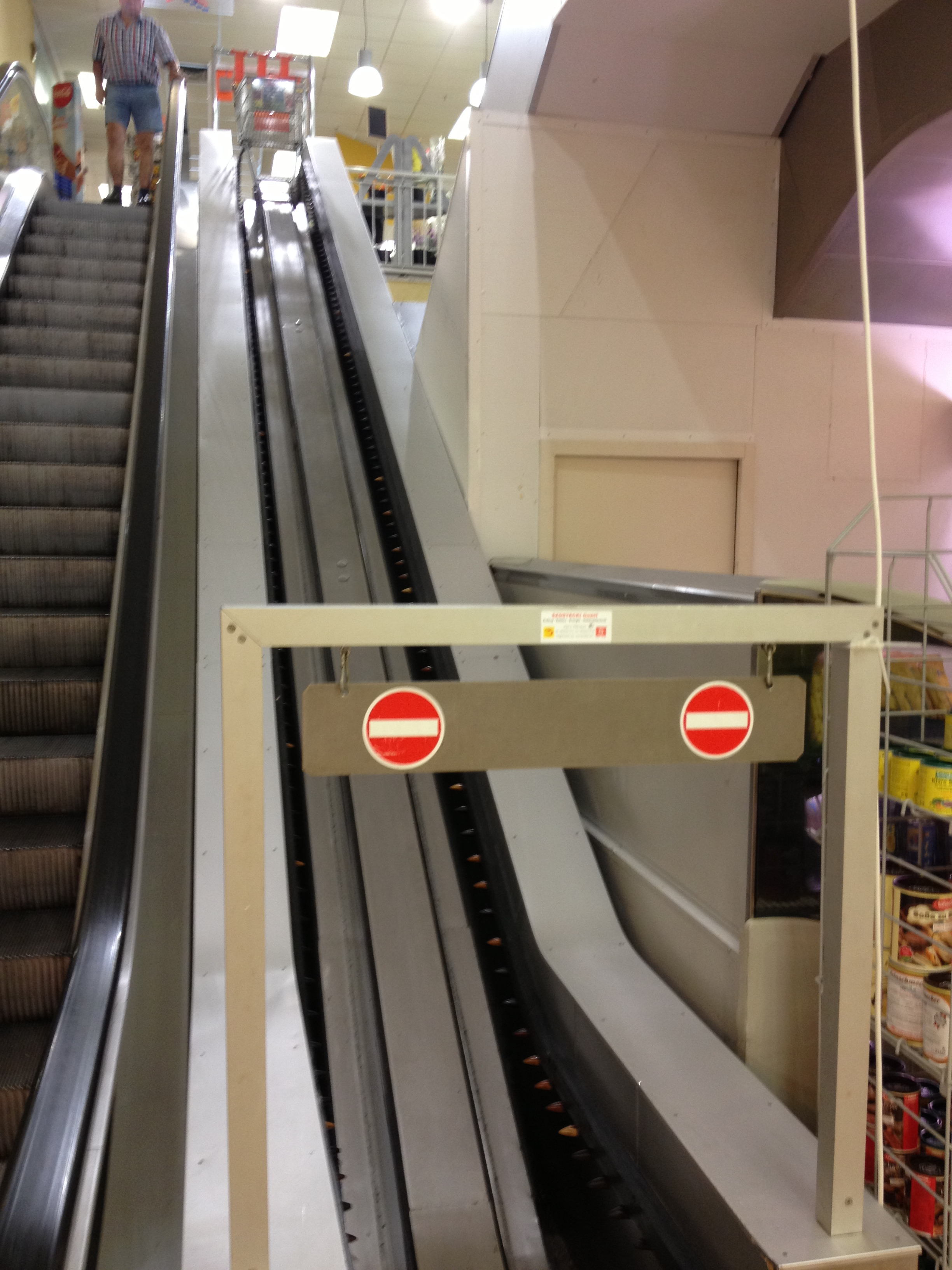 Eine Rolltreppe für Einkaufswagen in einem Supermarkt